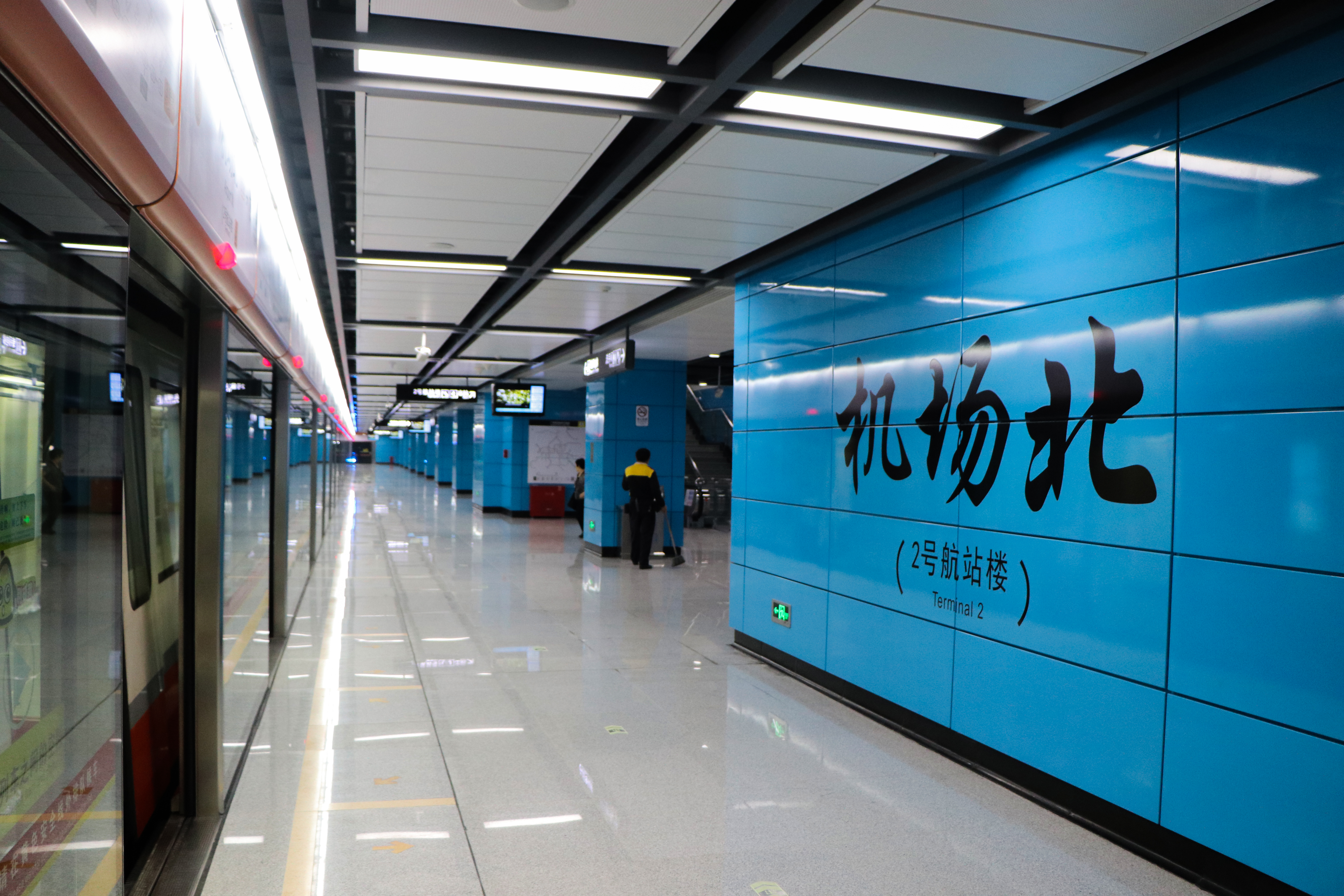 广州地铁机场北站